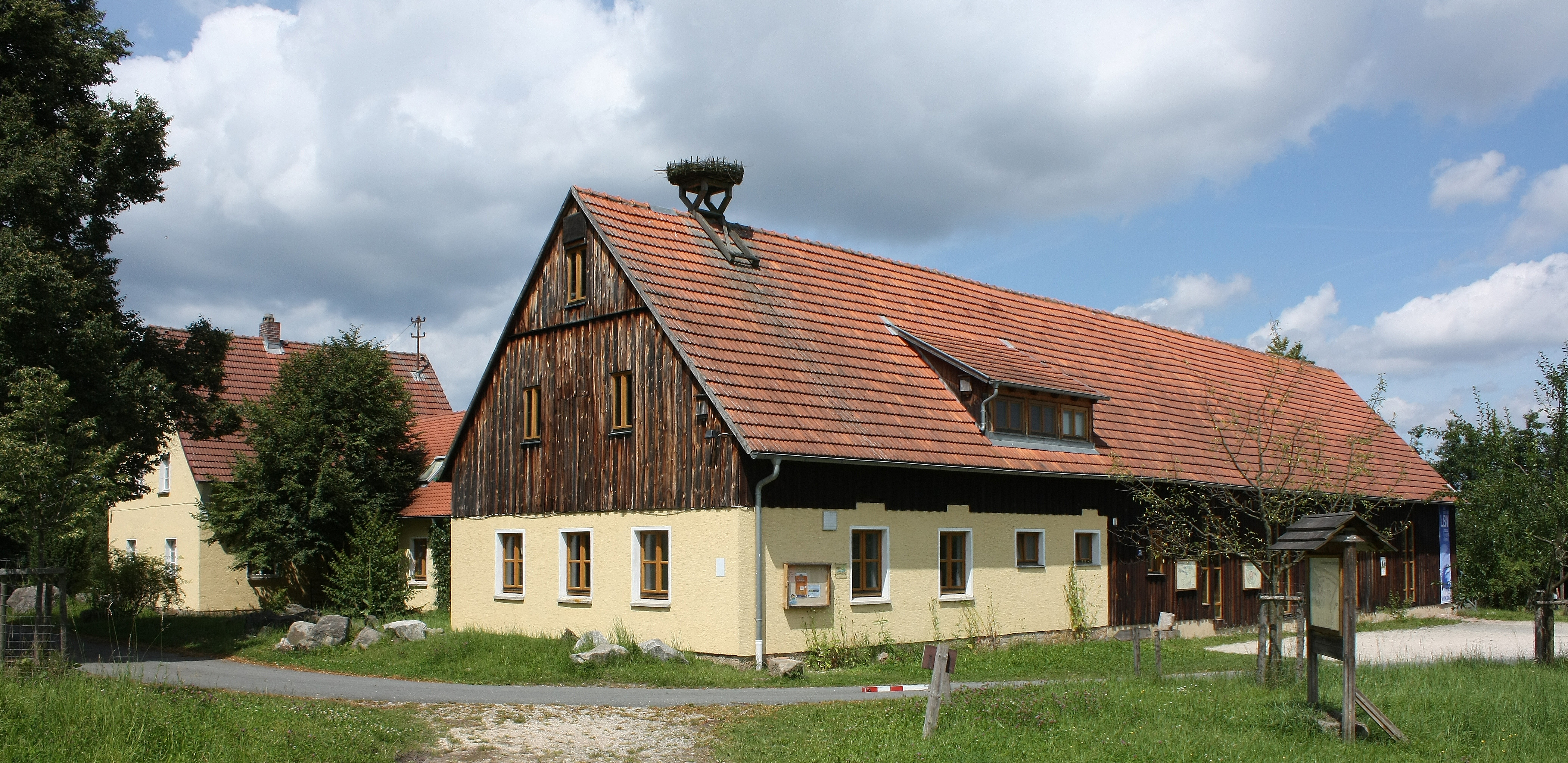 Lindenhof - Bayreuth (Umweltschutz-Informationszentrum Lindenhof des Landesbundes für Vogelschutz e.V.)